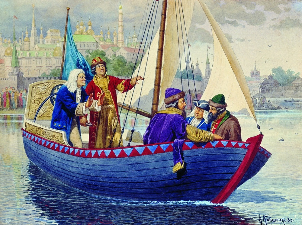 то картина русского художника Алексея Кившенко "Петр Первый управляет парусным ботиком"